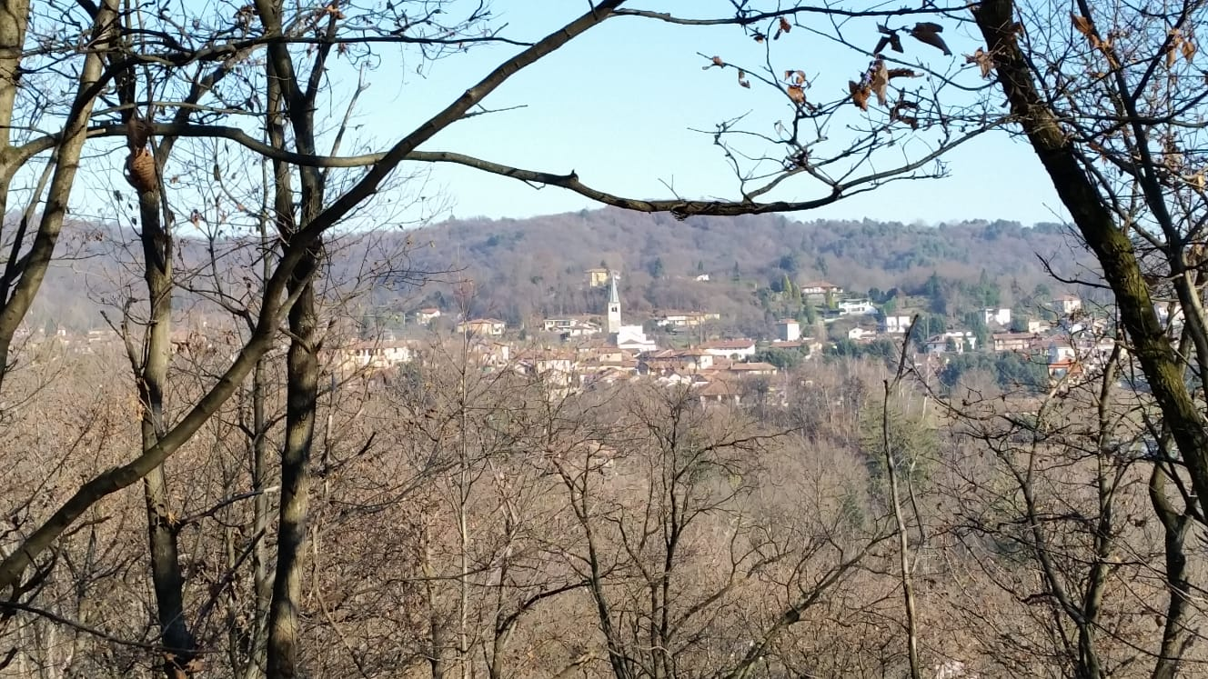 Bolzano novarese vista frontale